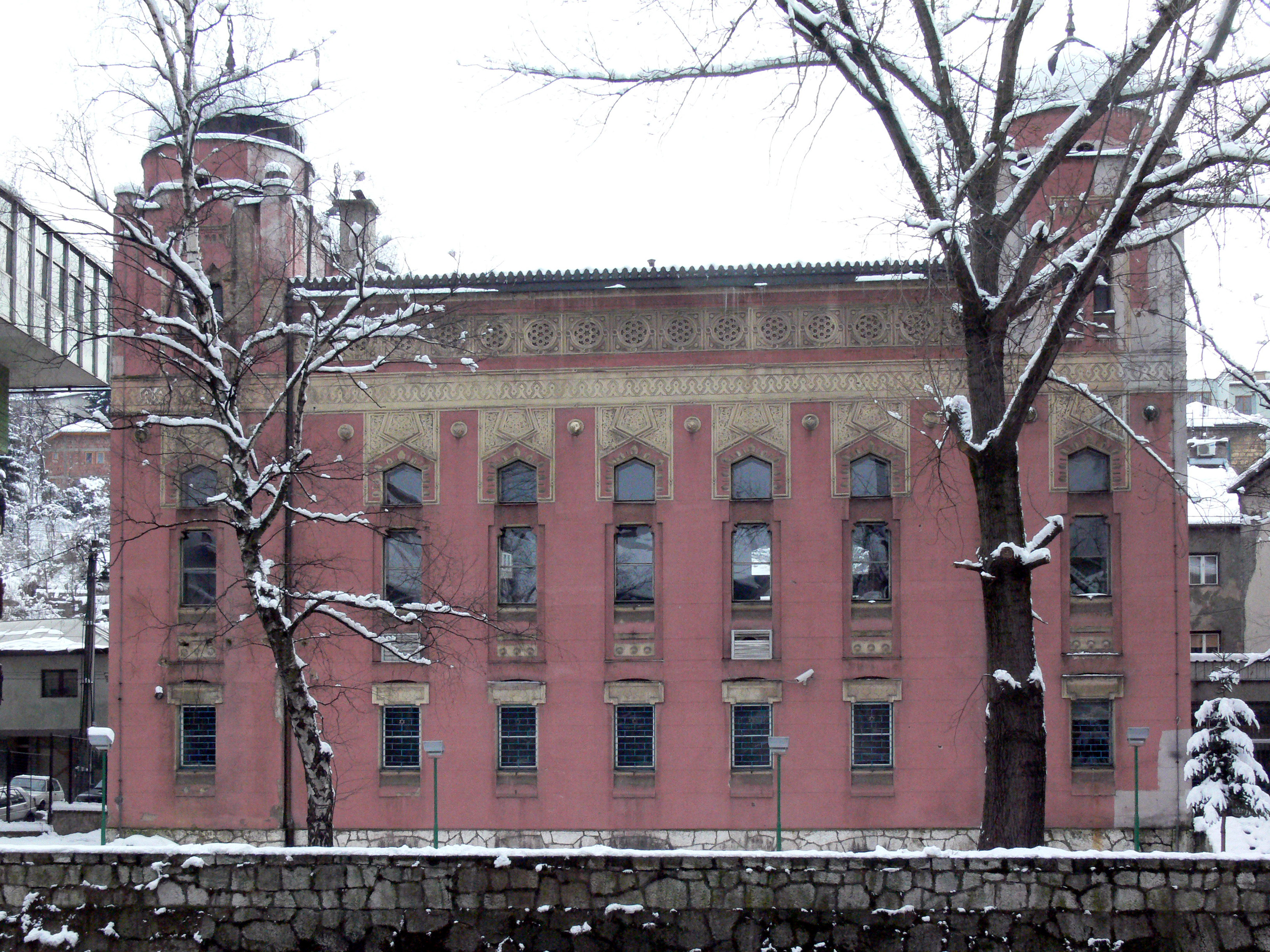 The synagogue in Sarajevo.